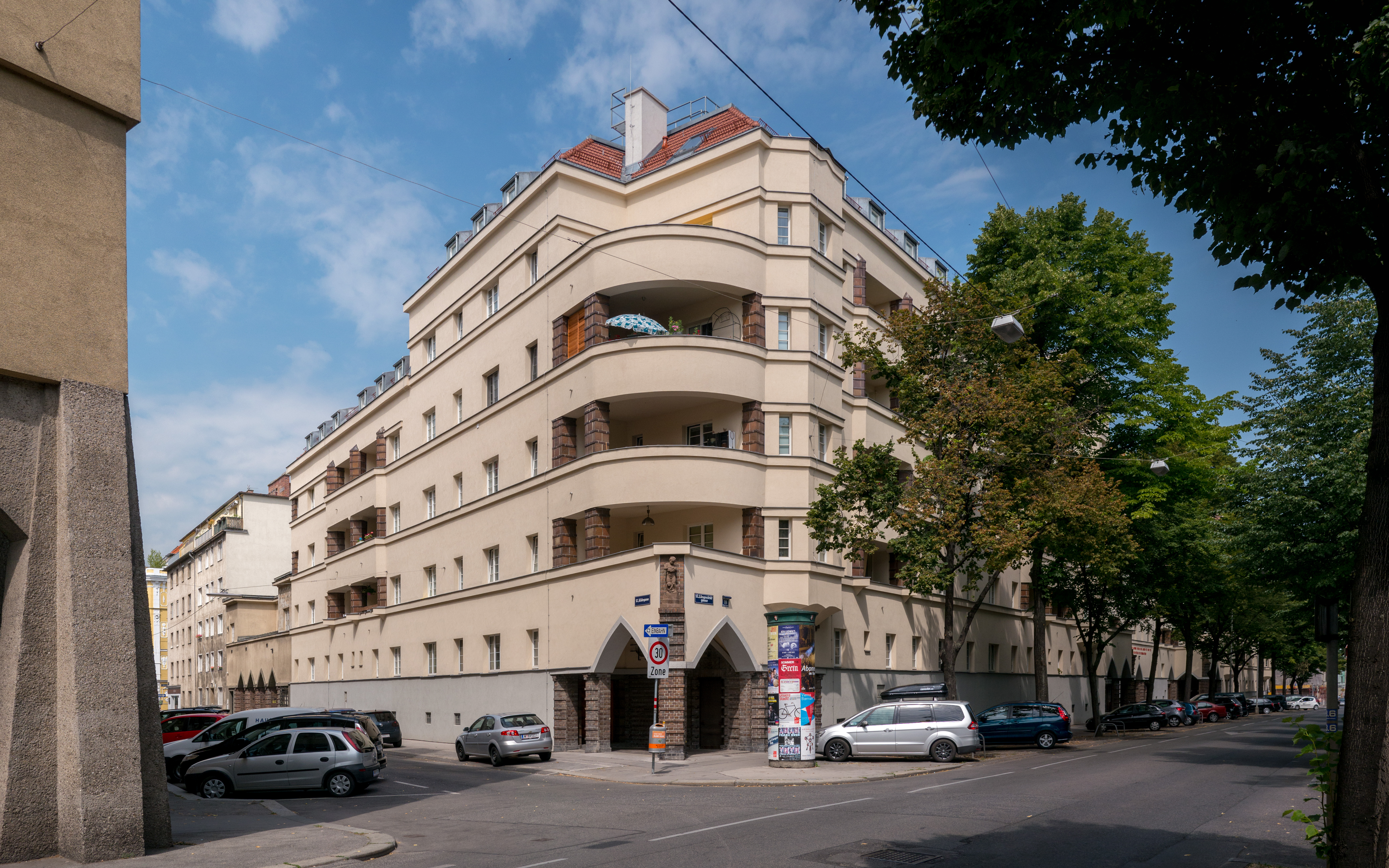 Kommunaler Wohnbau, Lorenshof